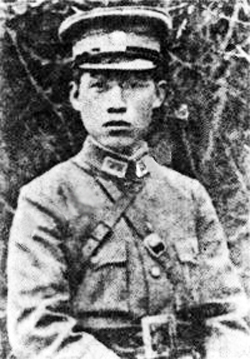 张岚峰